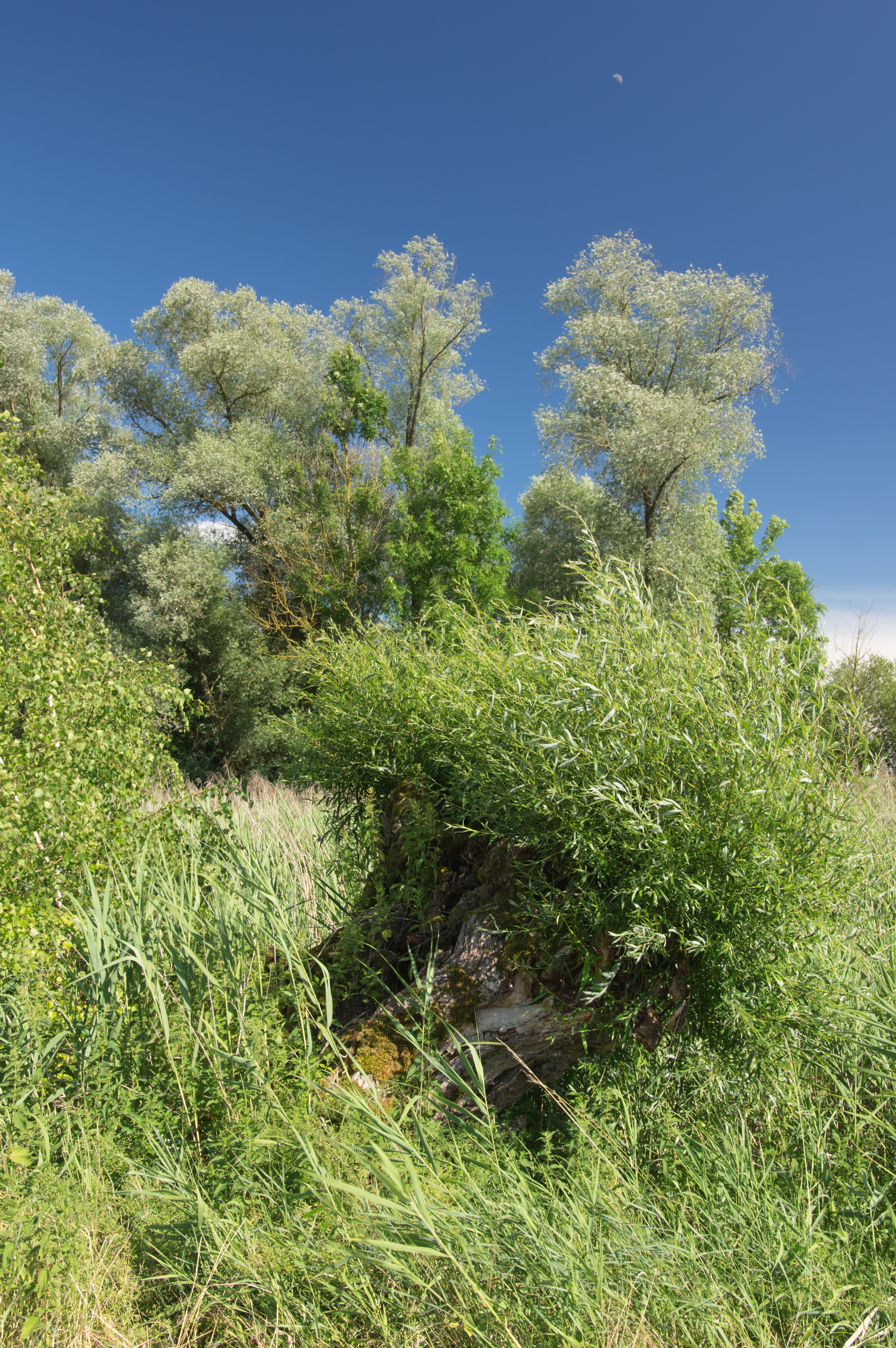 das Altwasser Rettingen bei Tapfheim zeichnet sich im Südwesten durch eine Anzahl alter und gedrungener Kopfweiden aus